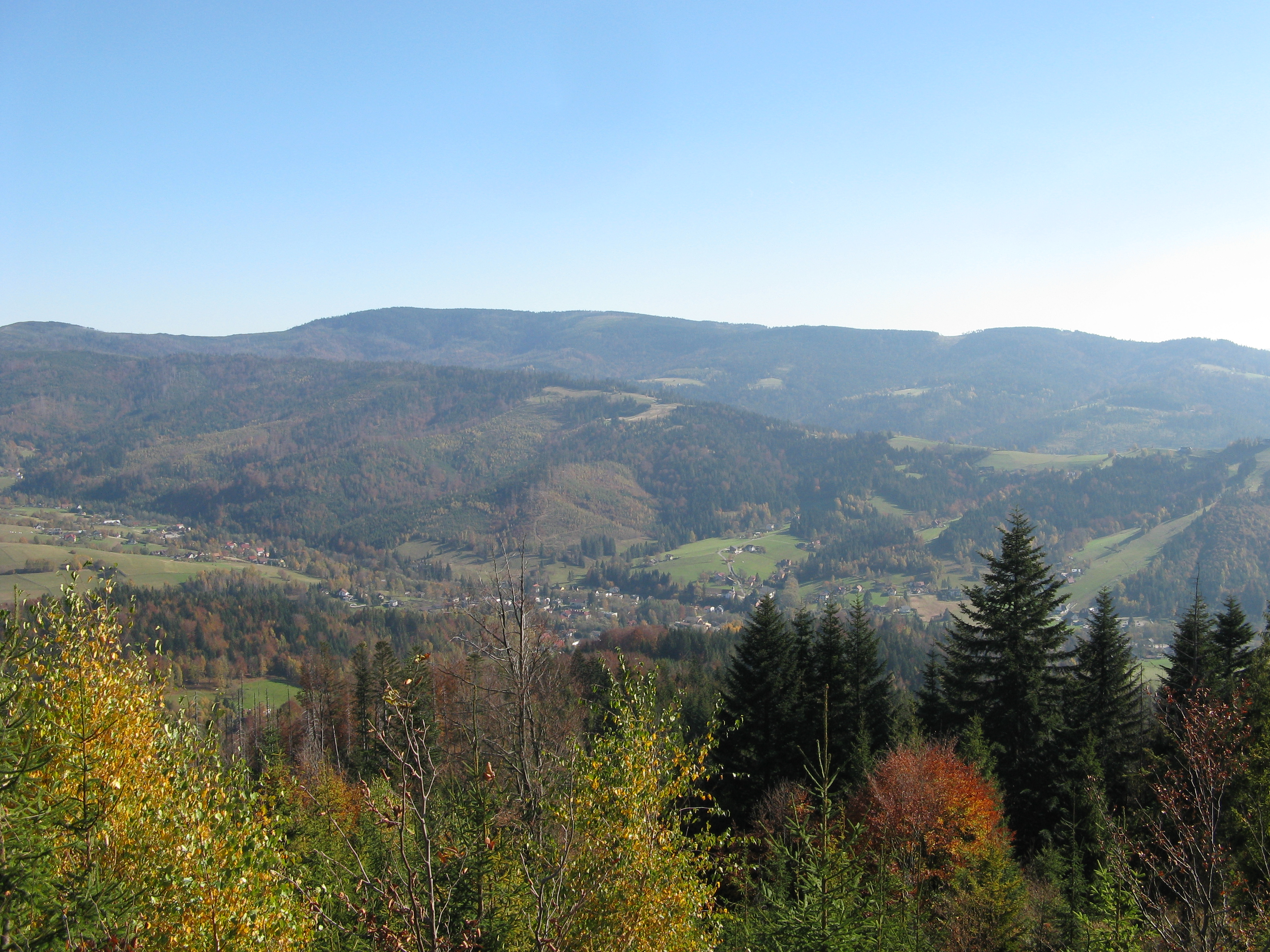 Barania Góra, Przysłop, Przypór z Czupla (882 m n.p.m.).